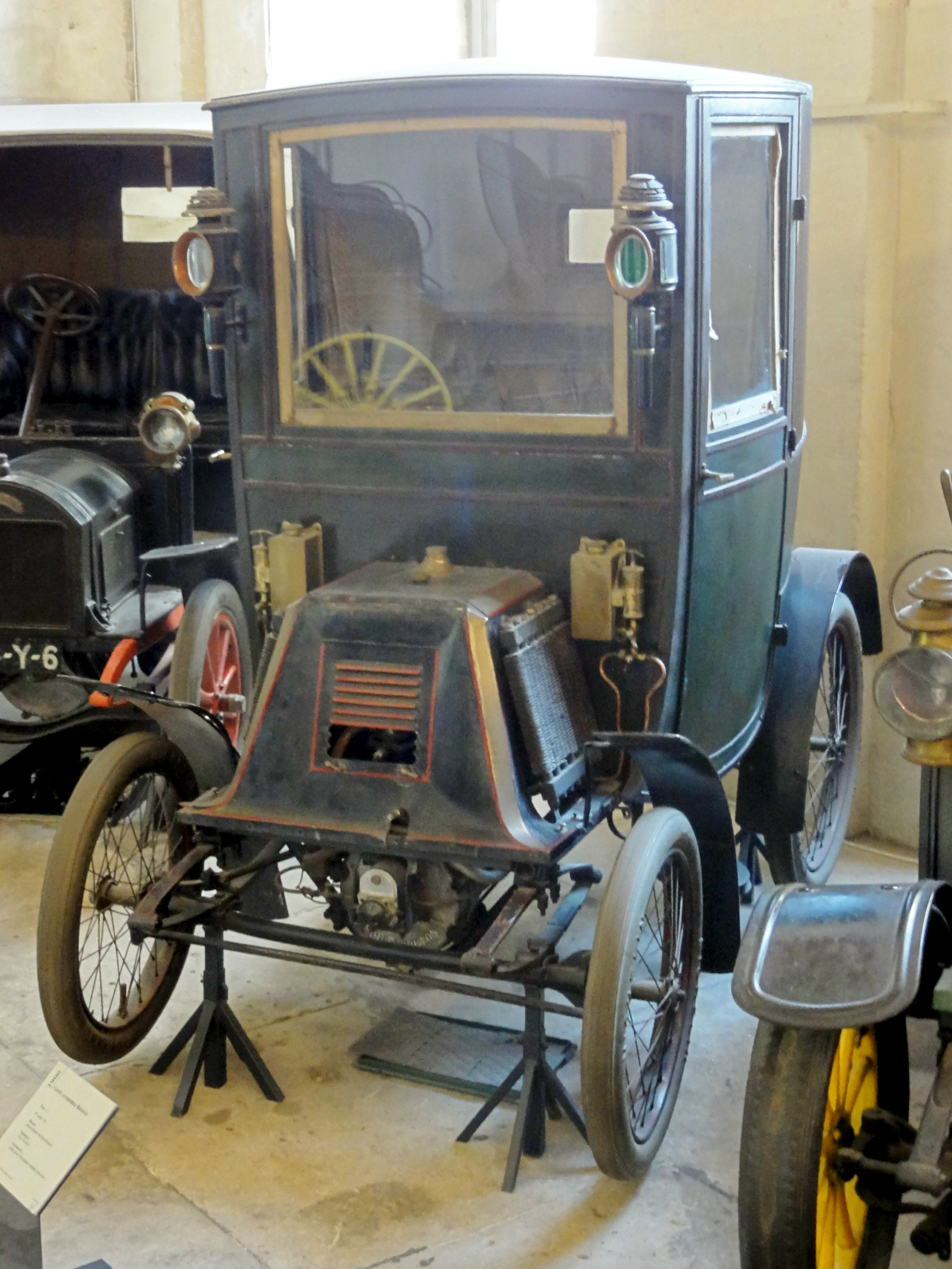 Coupé automobile Renault frères, type C, 1900.